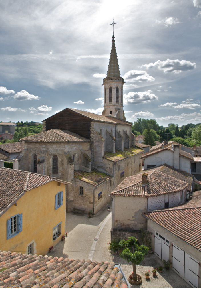 Vue du village médiéval depuis la tour de ville de Sarrant